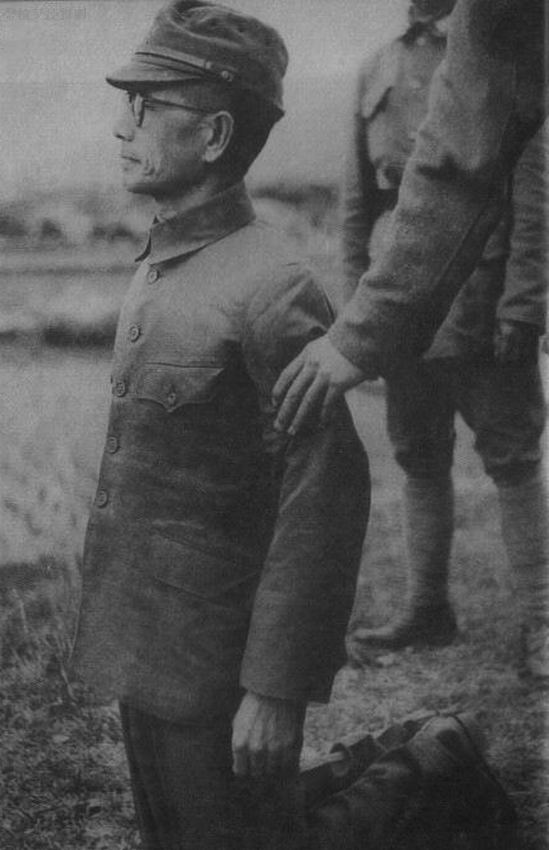 Japanese General Tanaka Hisakazu awaiting execution